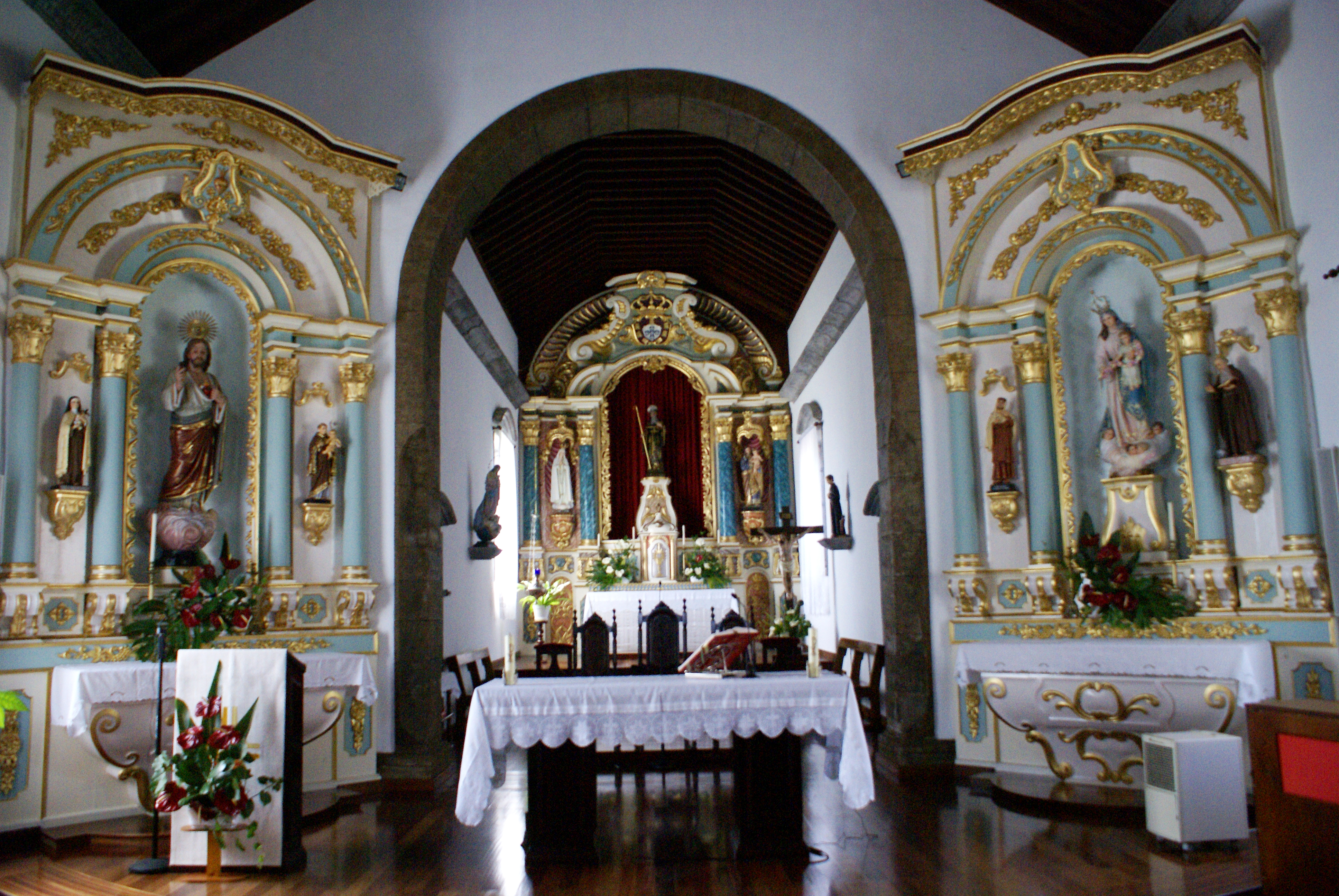 Igreja de Santo Amaro, altar-mor e altares laterais, Velas, ilha de São Jorge, Açores